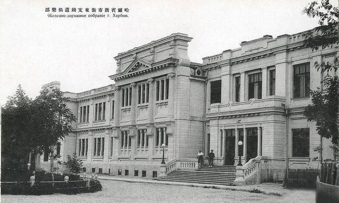 中文（香港）: 哈尔滨铁路文化宫